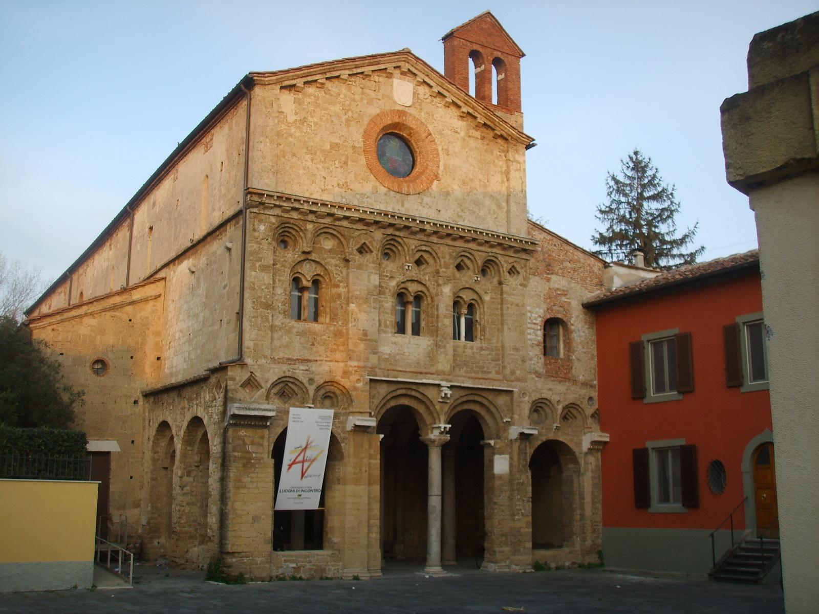 Abbazia_di_san_zeno in PIsa